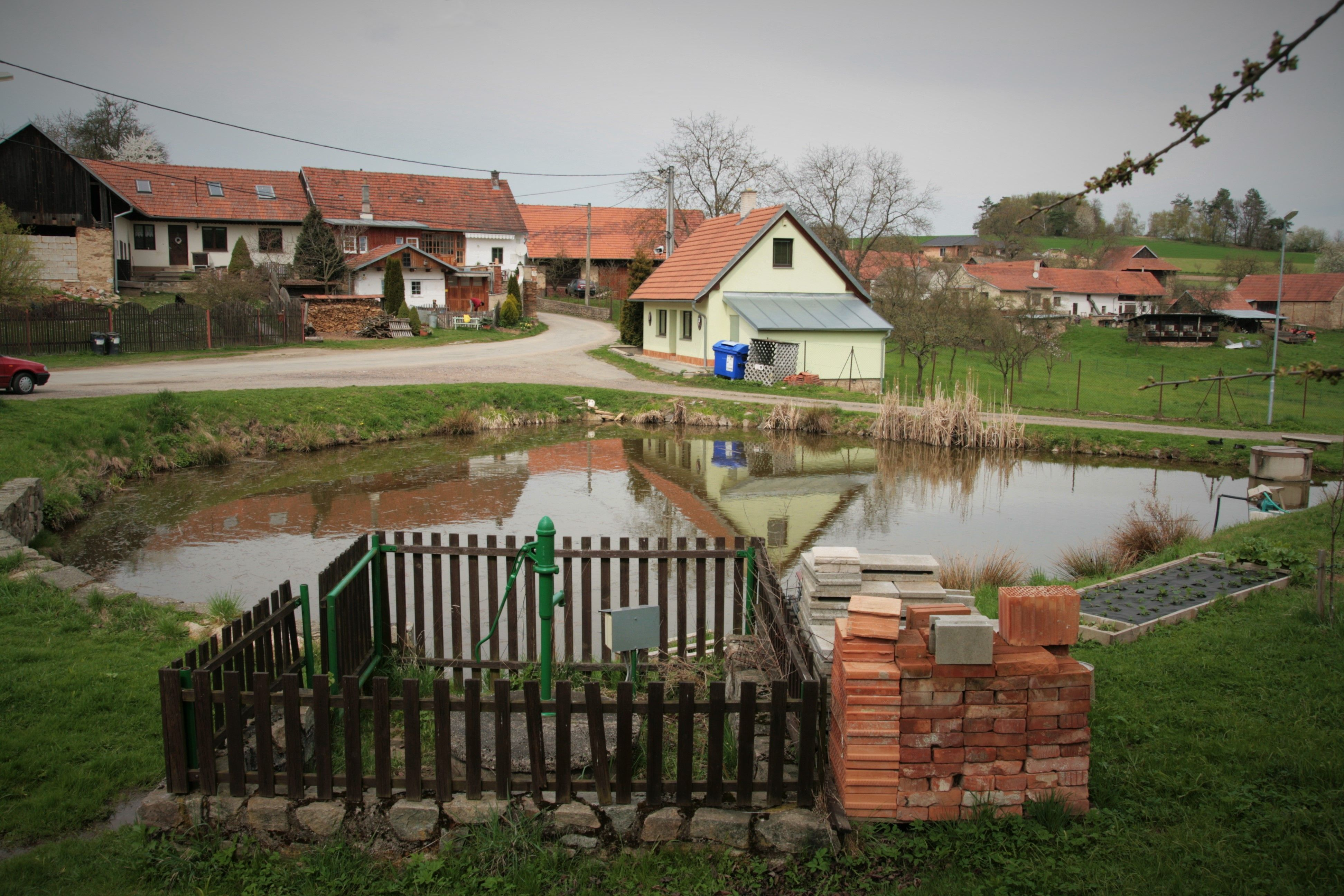 Obec Pernštejnské Jestřabí, okres Brno-venkov. Vodní nádrž na návsi s obecním úřadem v pozadí.